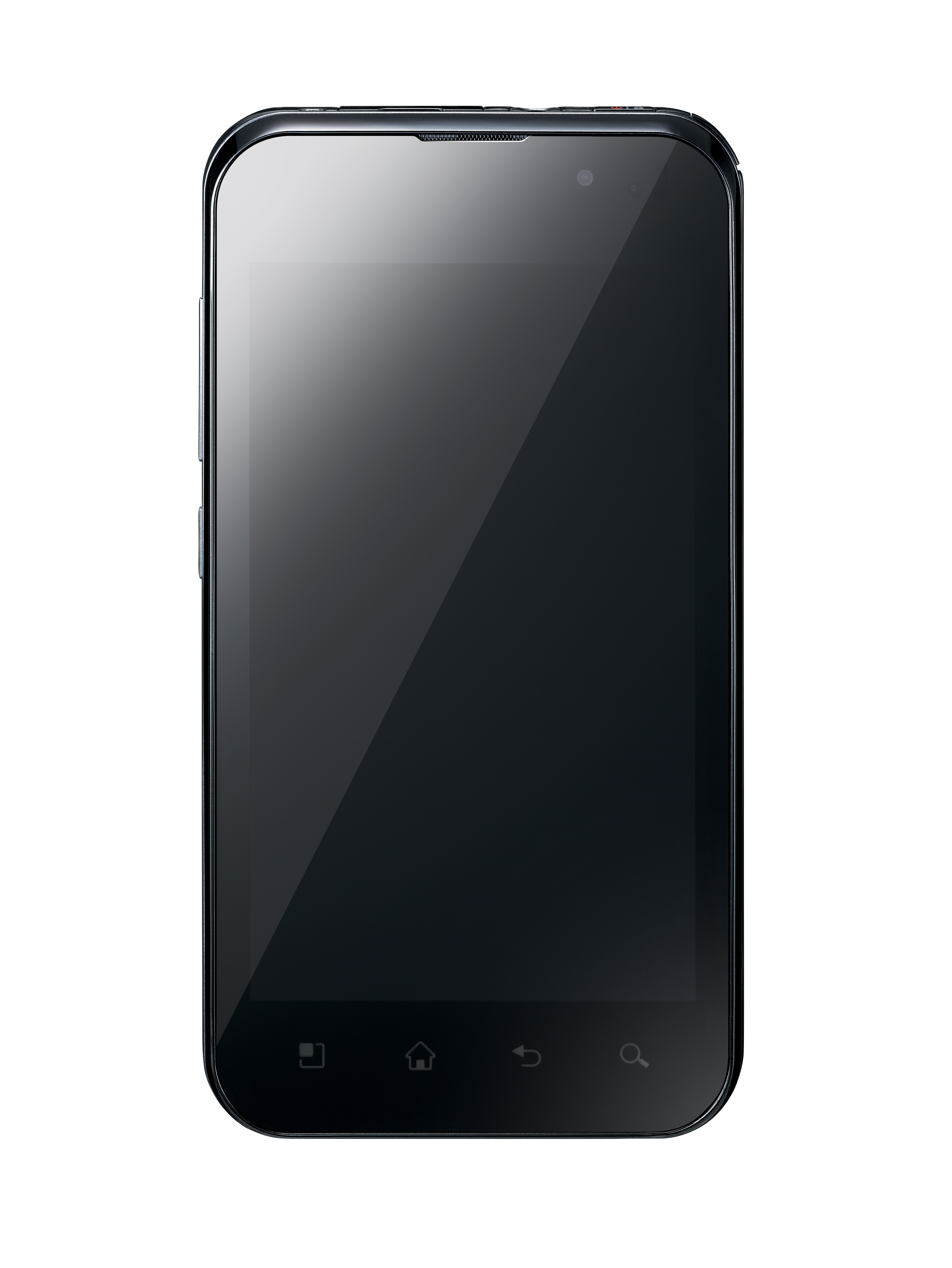 Lg전자가 더욱 얇고 가벼워진 고성능 쿼티 스마트폰 '옵티머스 Q2'를 다음주말부터 Lg u+를 통해 단독 출시한다. ※ LG전자 뉴스룸 에서 관련 보도자료를 확인실 수 있습니다.